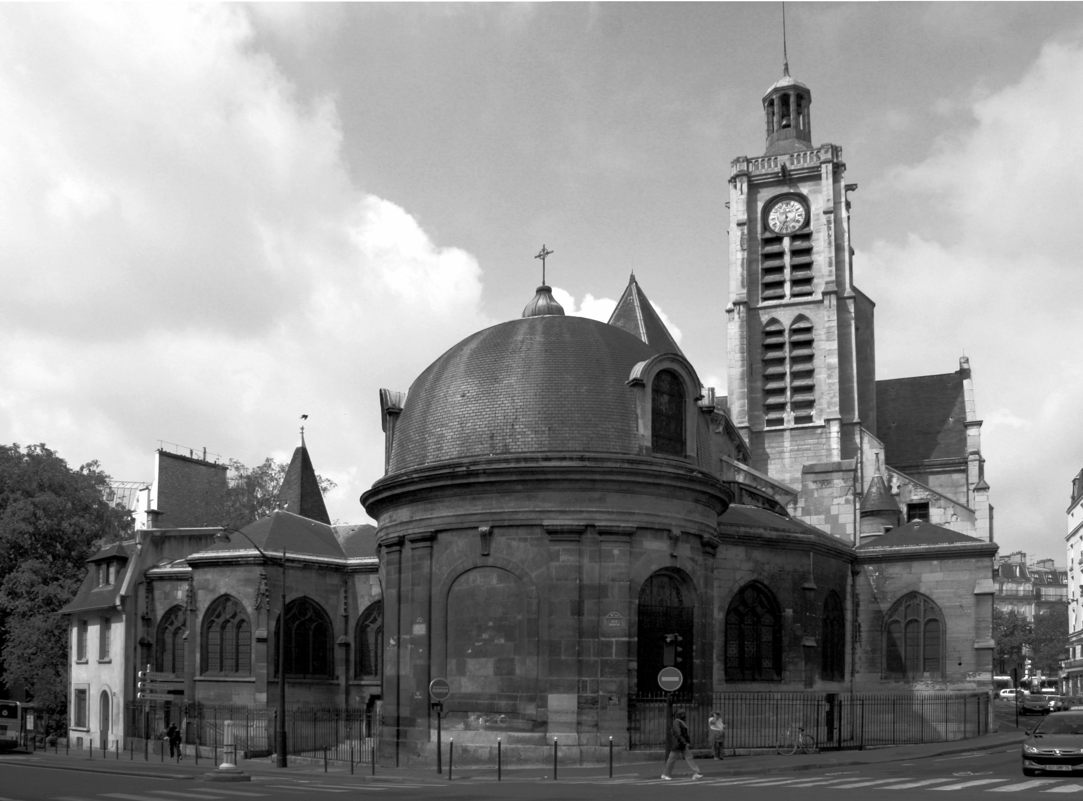 Photo du chevet de l'église Saint-Laurent (Paris)